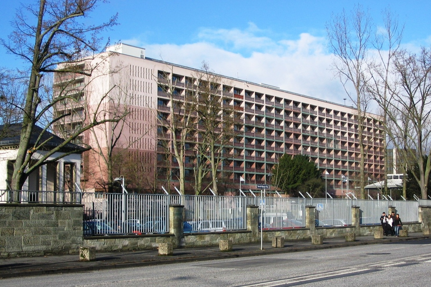 Im Amelia Earhart Complex am Konrad-Adenauer-Ring sind U.S.-Militärdienststellen untergebracht. Dies ist einer der letzten miltitärischen Sicherheitsbereiche in der Kernstadt von Wiesbaden.